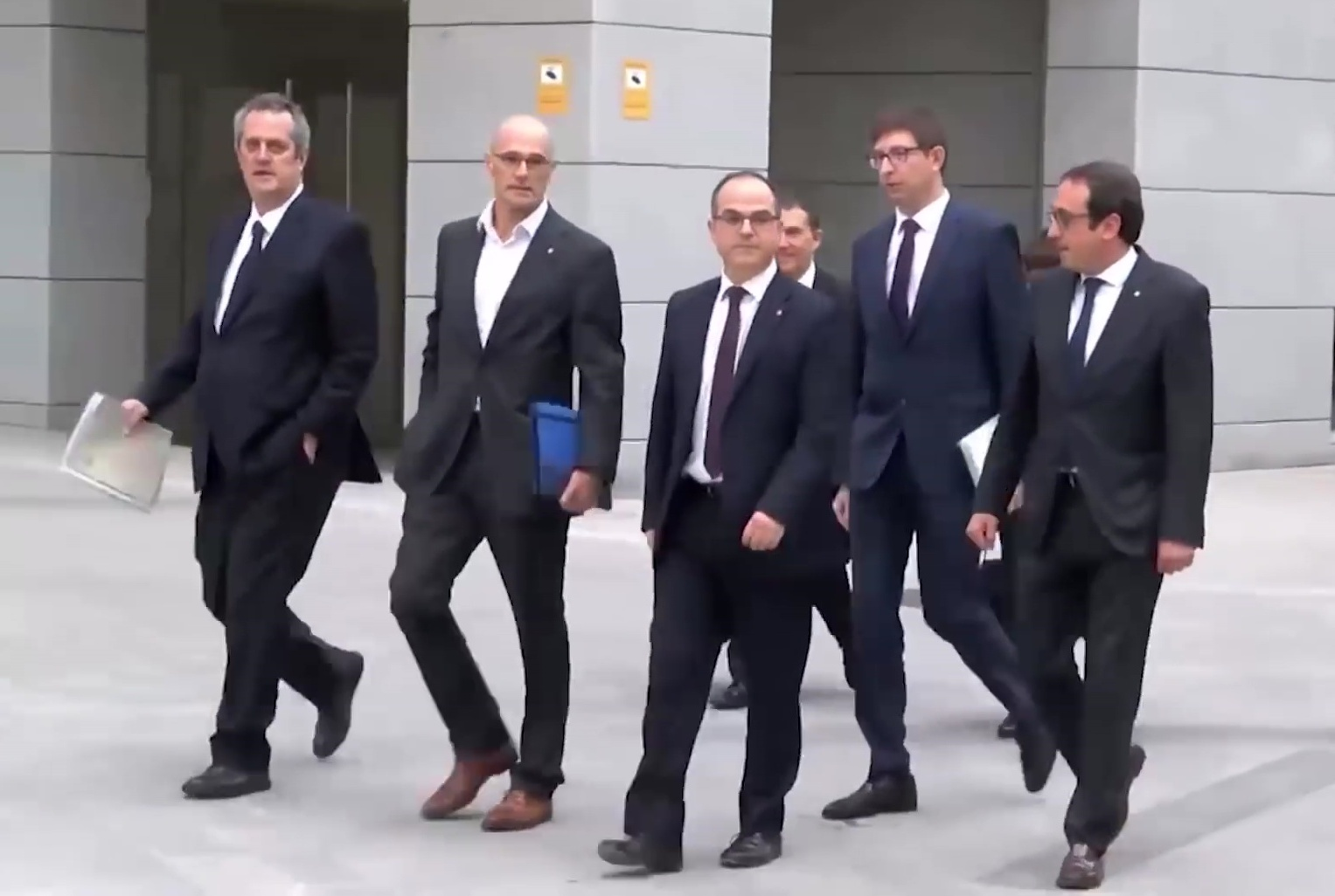 La jueza de la Audiencia Nacional Carmen Lamela ha acordado enviar a prisión sin fianza a Oriol Junqueras y a otros siete consellers que han comparecido este jueves, acusados de rebelión, sedición y malversación de fondos públicos.